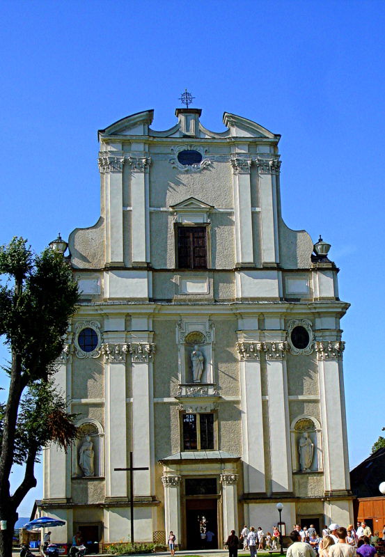 Krzeszów - kościół pomocniczy św. Józefa (zabytek nr rejestr. A/2056/913 z 31.07.1961)